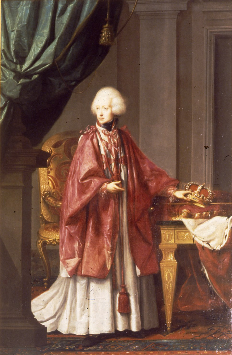 Ritratto di Ludovico I di Etruria (1773-1803)